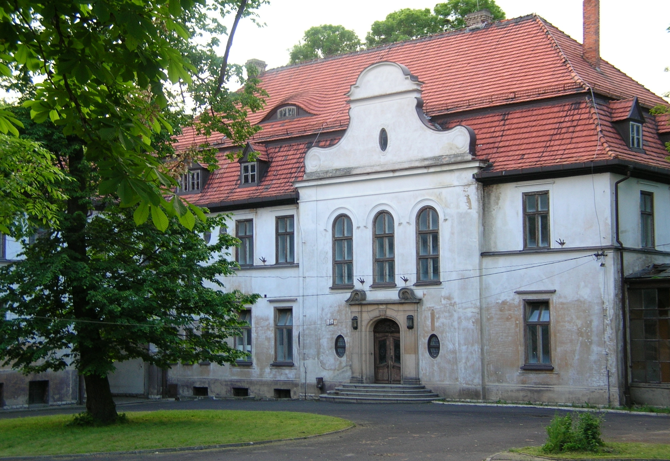 Palace (end XIX c.) in Kujawy (Opole Silesia) von Tiele Winckler.